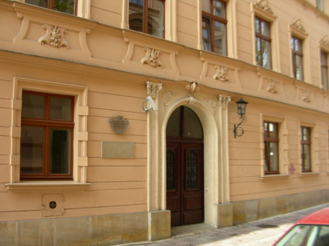 Budynek Collegium Opolskiego Uniwersytetu Jagiellońskiego przy ulicy Gołębiej 14